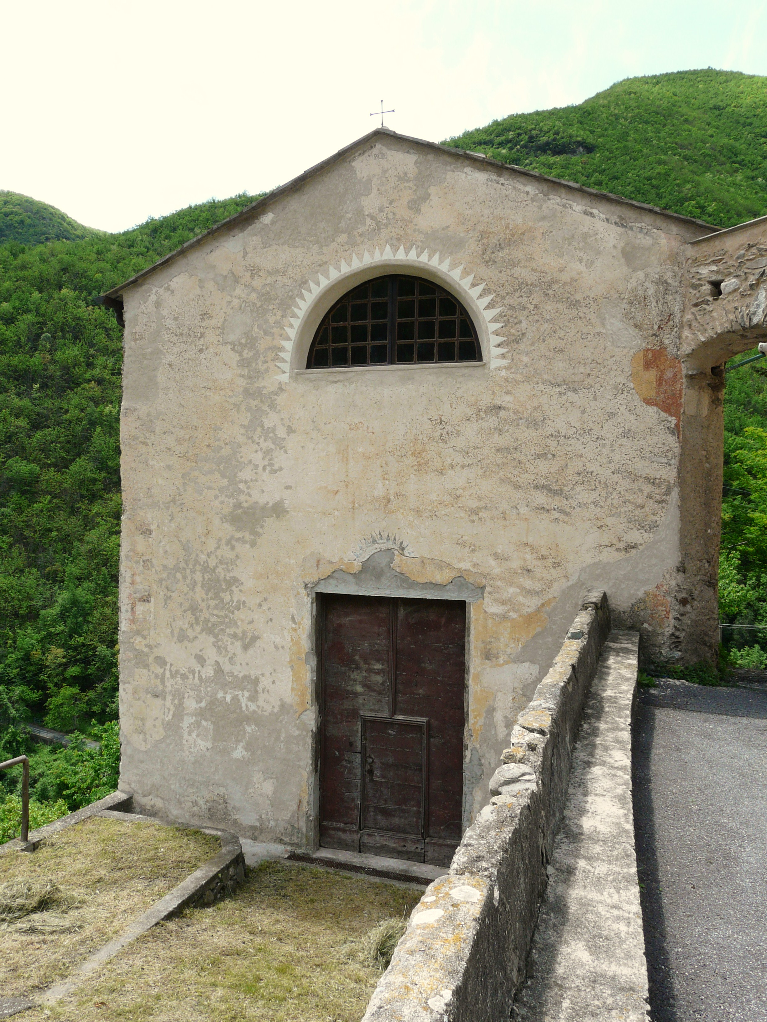 Oratorio presso Nasino, Liguria, Italia